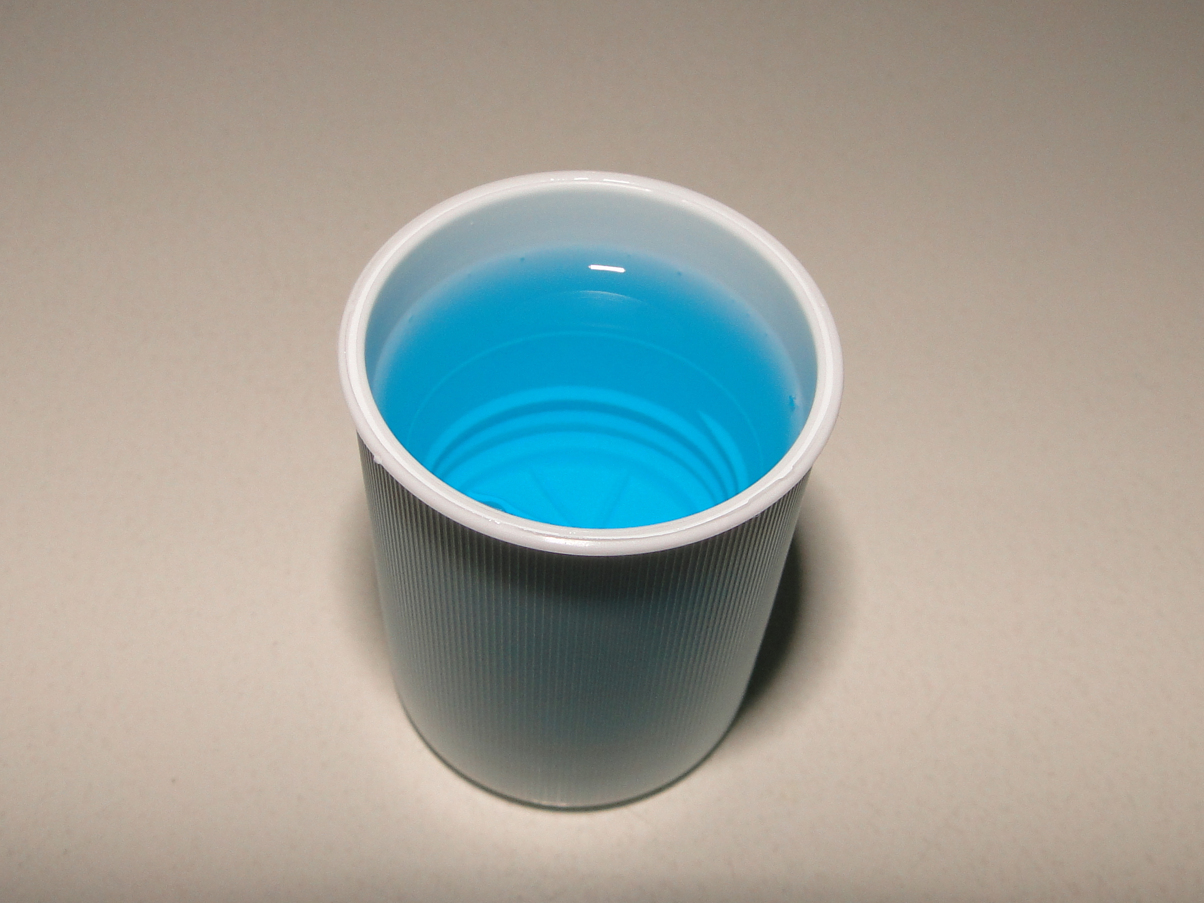 Fertiges Mundwasser dosiert in zugehöriger Verschlusskappe.